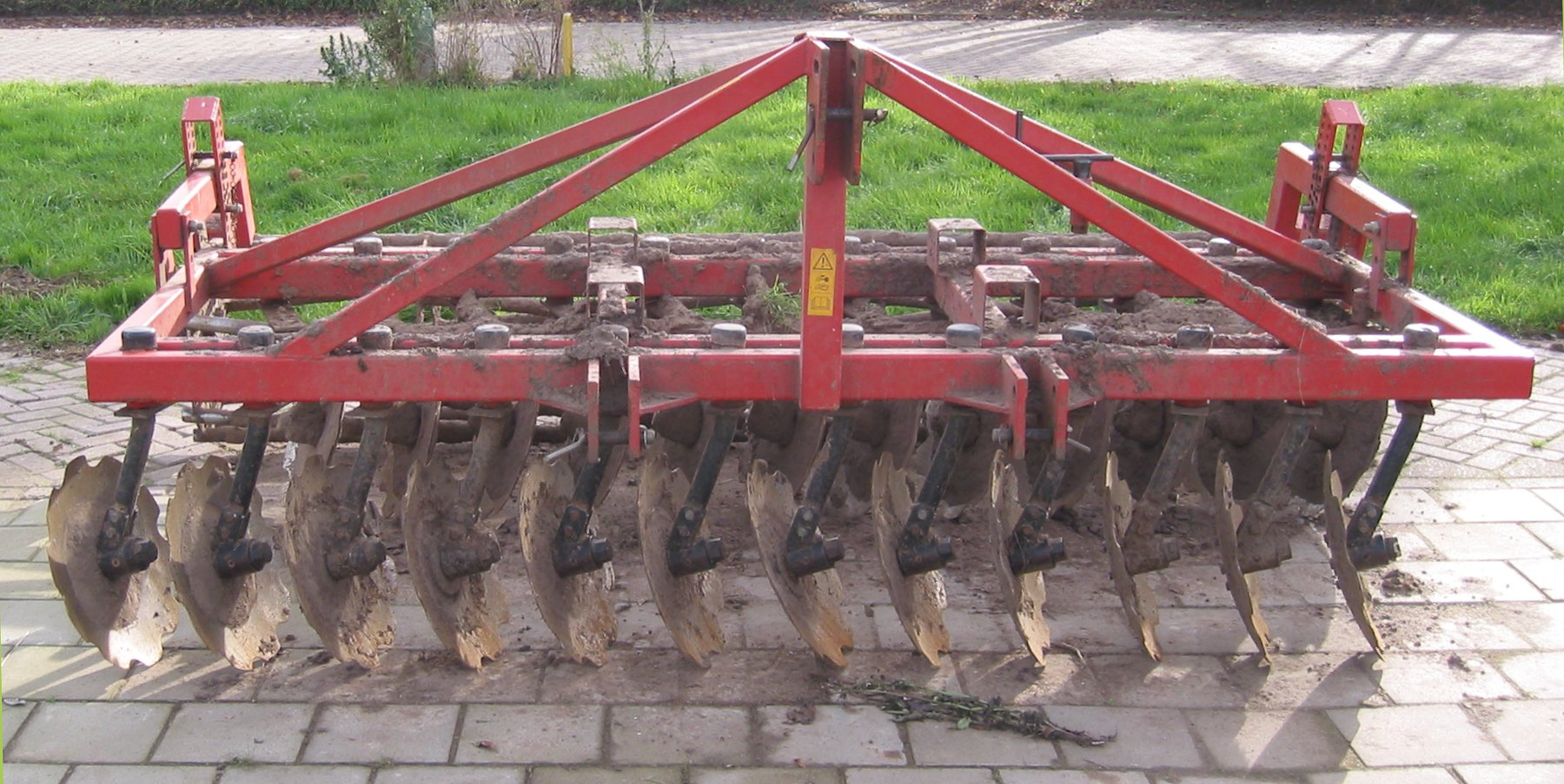 Voorkant schijveneg